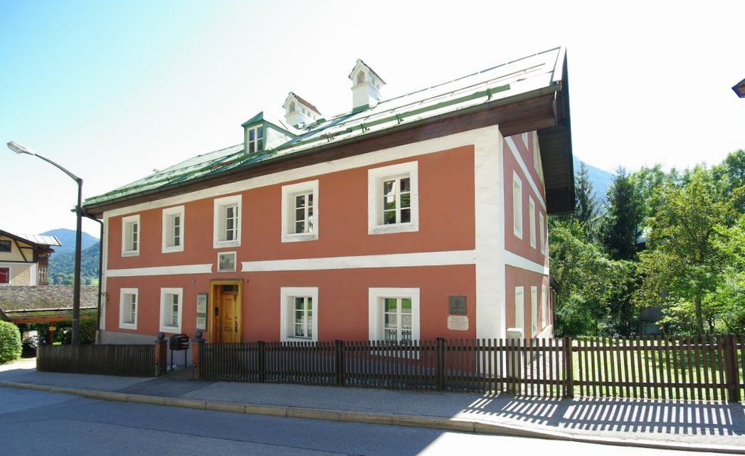 Salzburger Str. 2, 83471 BerchtesgadenThis is a photograph of an architectural monument.